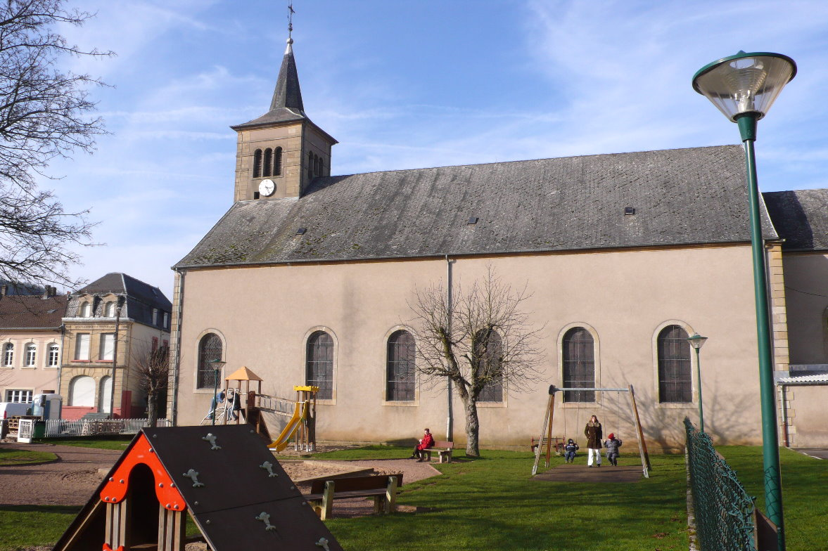 Kierch Volmérange.